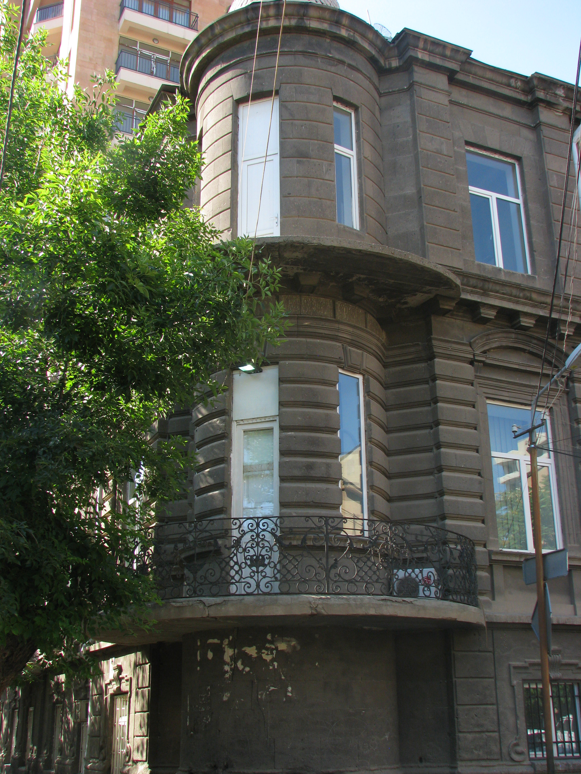 Ներկայիս Փիլիսոփայության ինստիտուտի շենքը նախկինում եղել է Ֆադեյ Թադևոսյանի տունը 6/206.6